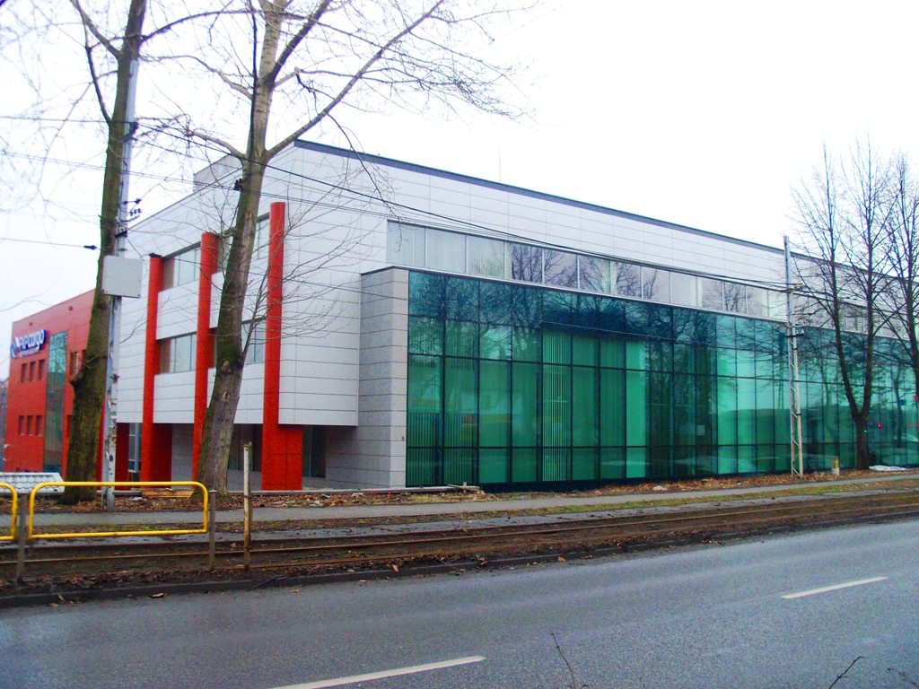 aleja Korfantego w Katowicach - budynek PKP Cargo